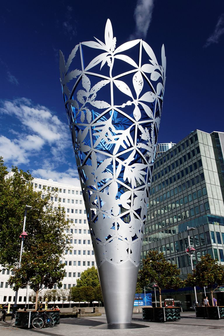 20100130-14-Metal Chalice sculpture